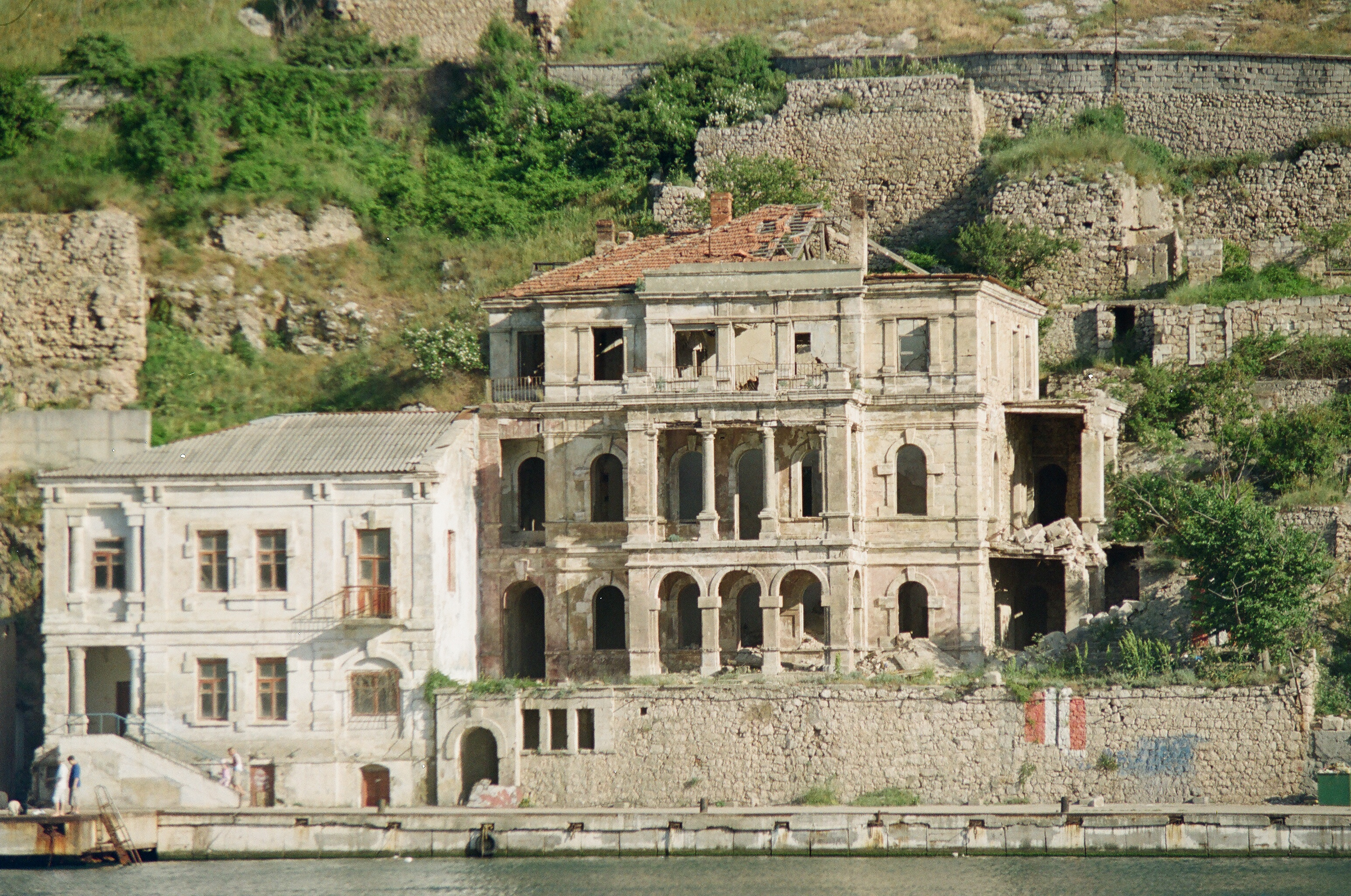 Набережна Назукіна, Балаклава, Набережна Назукіна